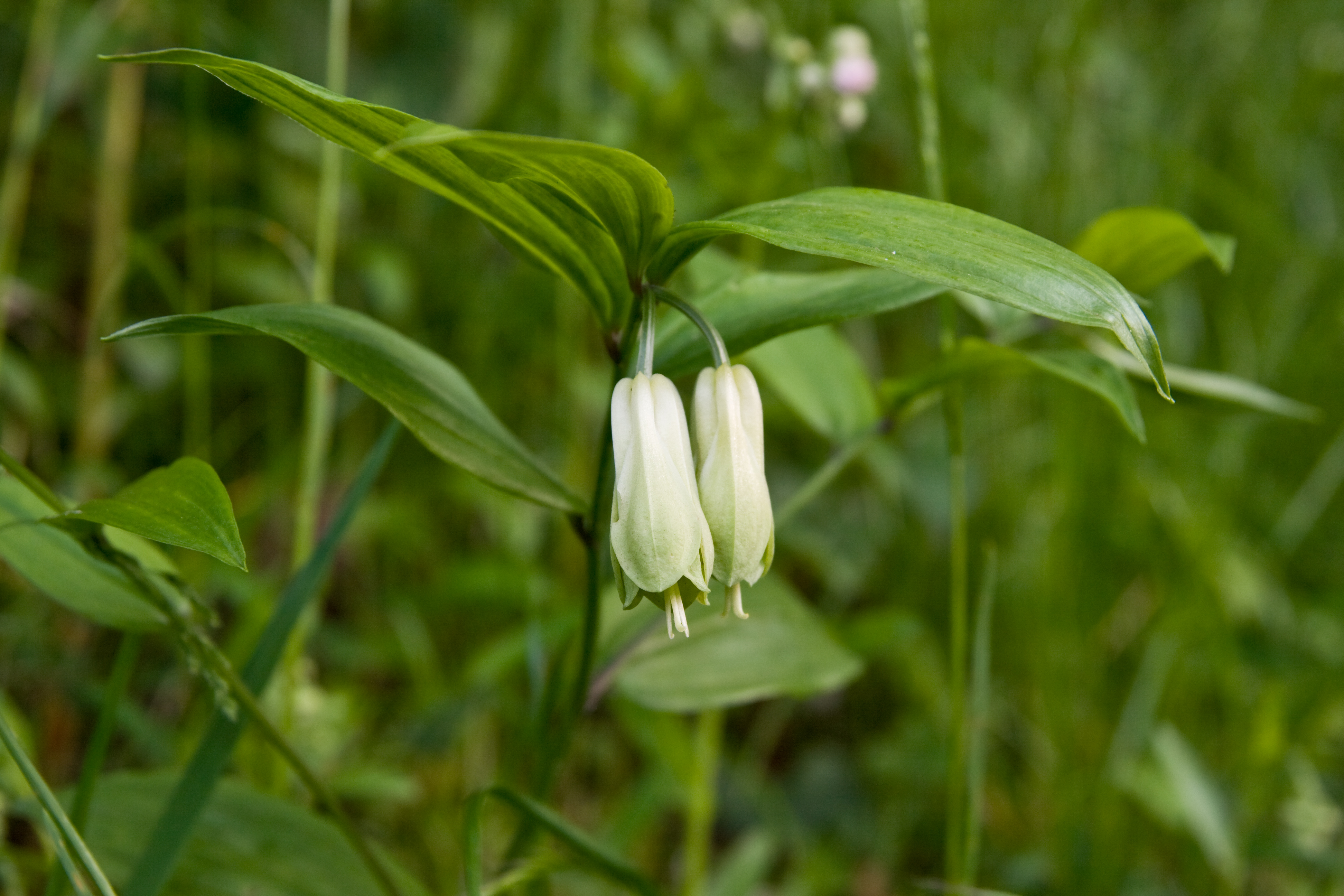 ホウチャクソウ (学名:Disporum sessile)